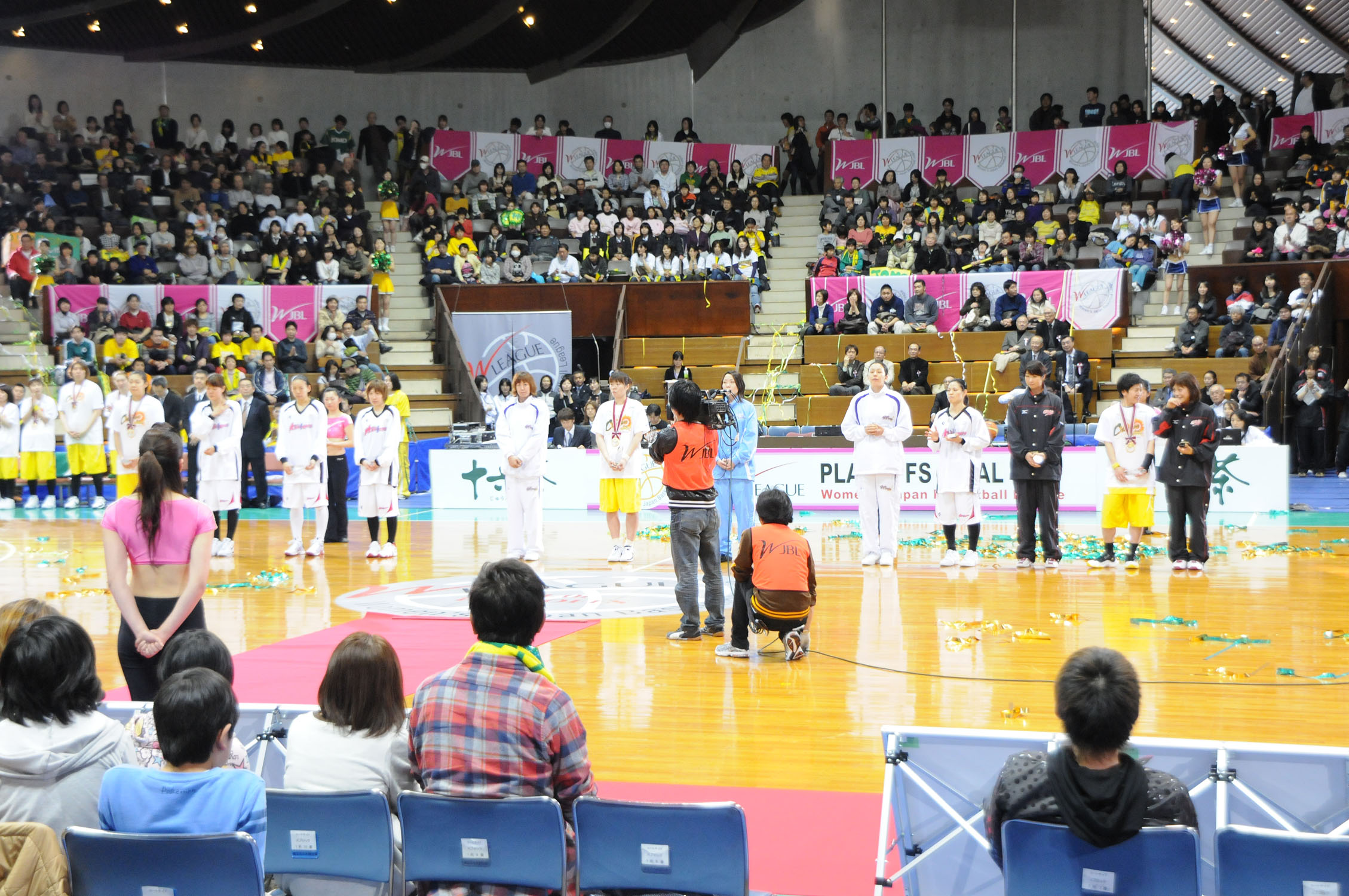 第11回Ｗリーグ アウォード表彰。代々木第二体育館で。